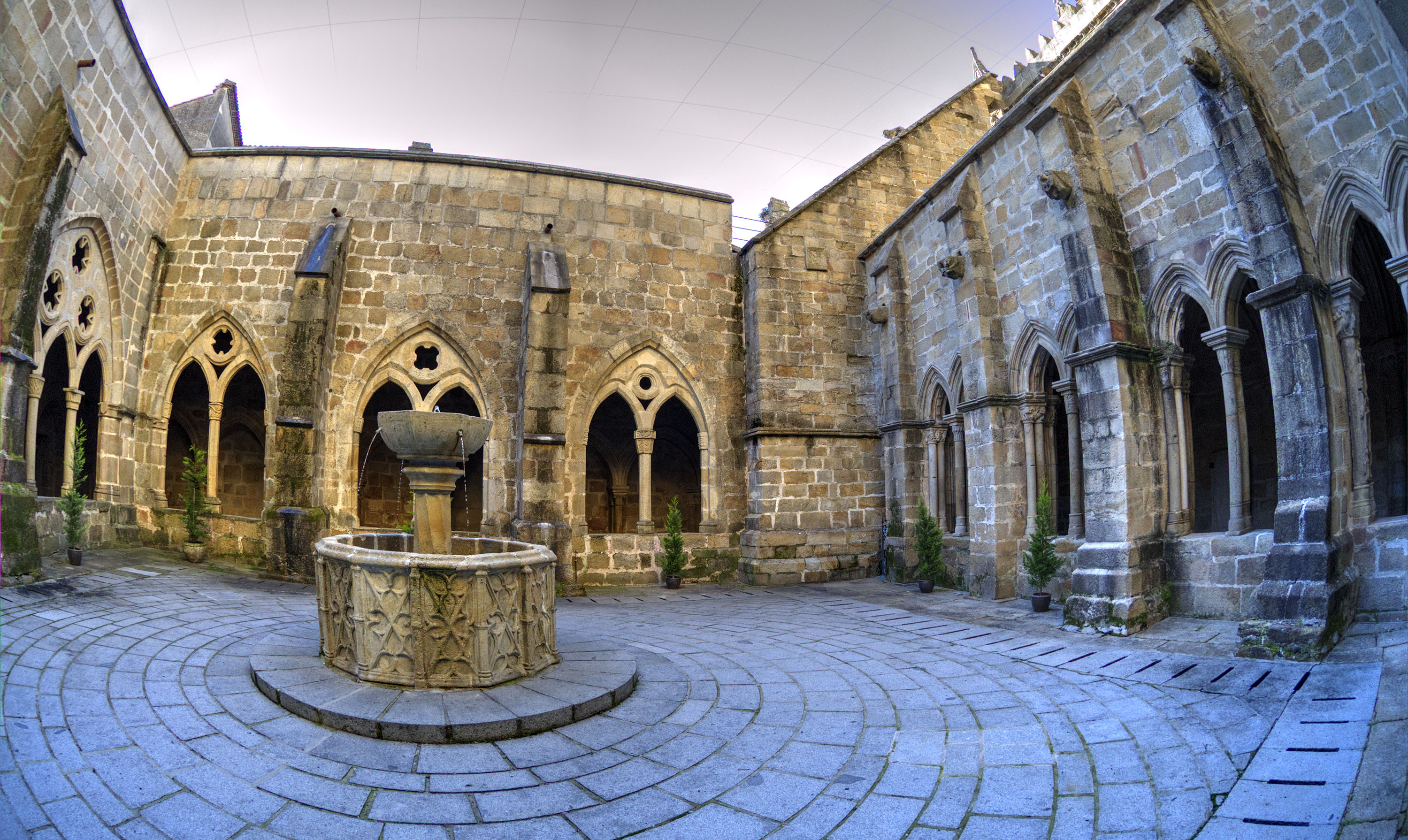 Este claustro y la sala capitular es lo que queda de la construcción más antigua, iniciada a principios del siglo XIII y finalizada en el XIV. Quedan vestigios románicos en algunas columnas y especialmente en los capiteles, pero es dominante la influencia del gótico. La fuente es del siglo XV.